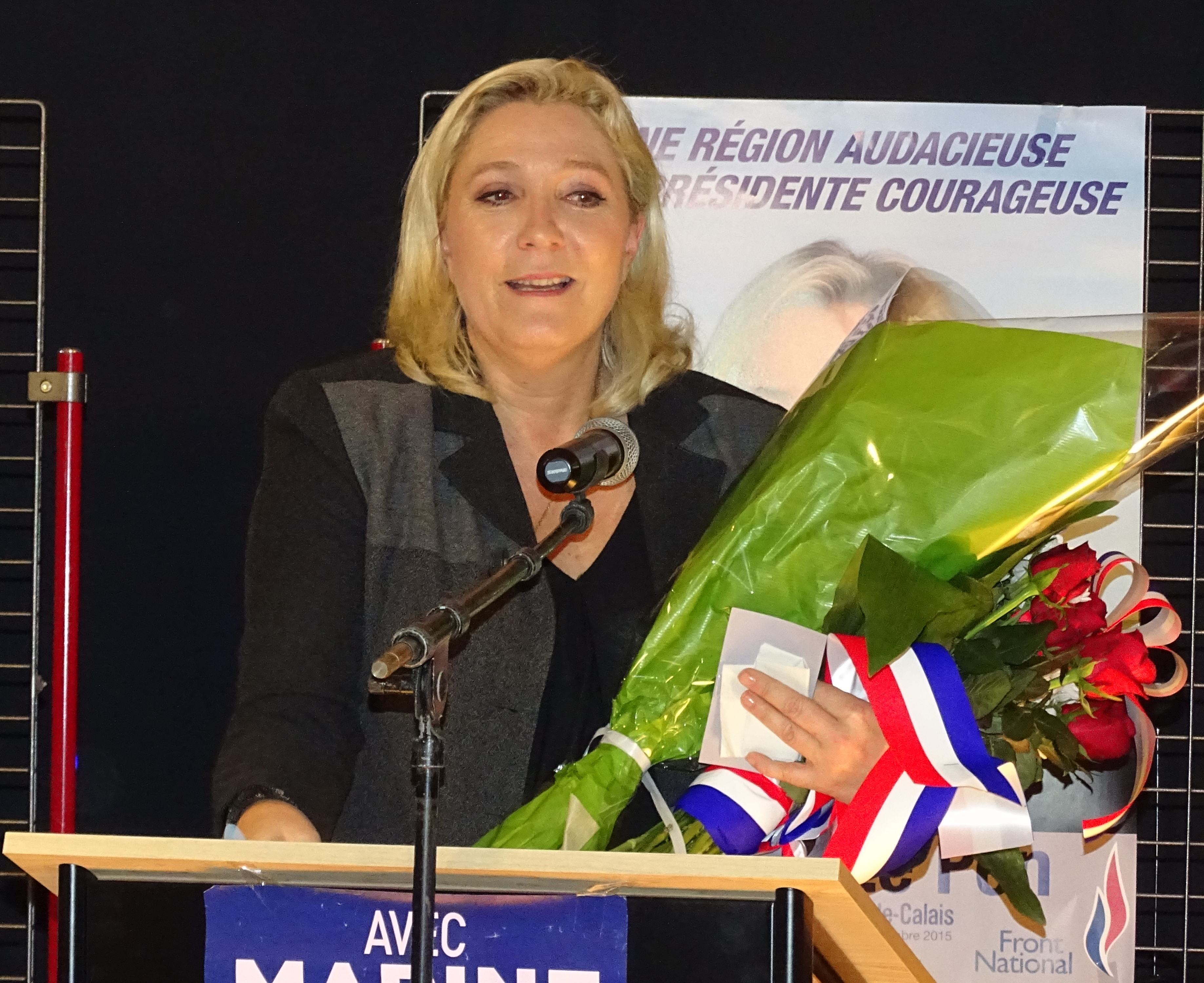 Meeting de Marine Le Pen à Raismes le vendredi 16 octobre 2015 sur l'élection régionale en Nord-Pas-de-Calais-Picardie.